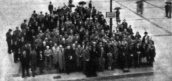 9-a Esperanto-Kongreso de jugoslavaj esperantistoj en Ljubljano, 1936.